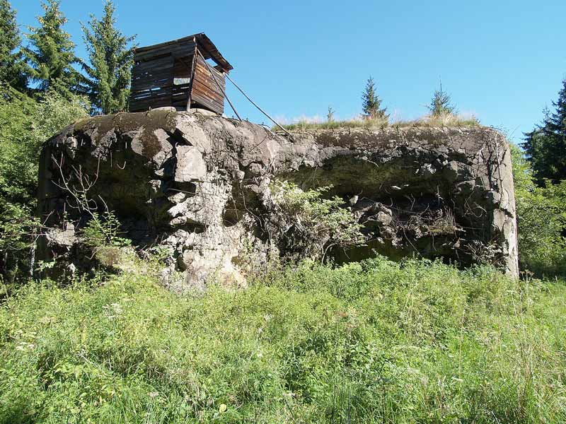 K-S 39 Hodek - pěchotní srub tvrze Adam